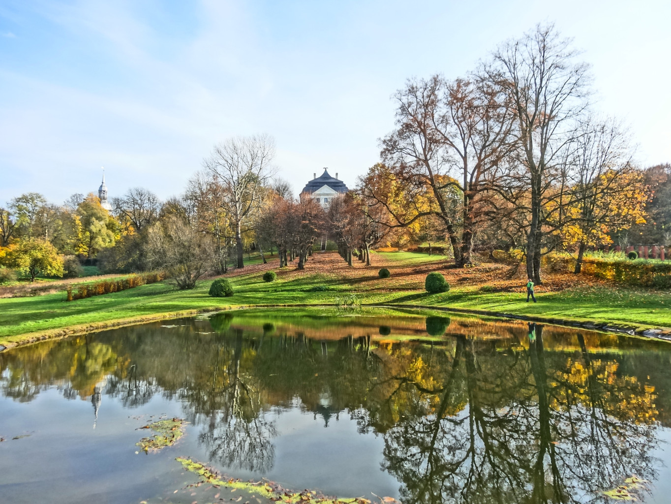 Zespół pałacowo-parkowy w Ostromecku k. Bydgoszczy - aleja prowadząca z doliny Wisły do pałacu Mostowskich